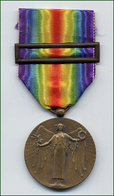 Medalha da Victoria Portuguesa